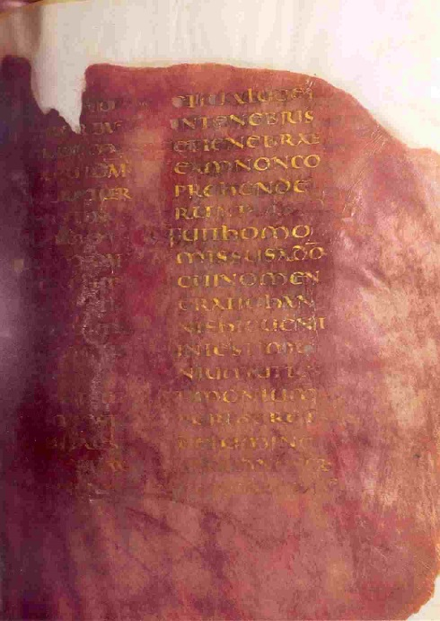 Codex Veronensis bilingwiczny purpurowy, kodeks ilustrowany